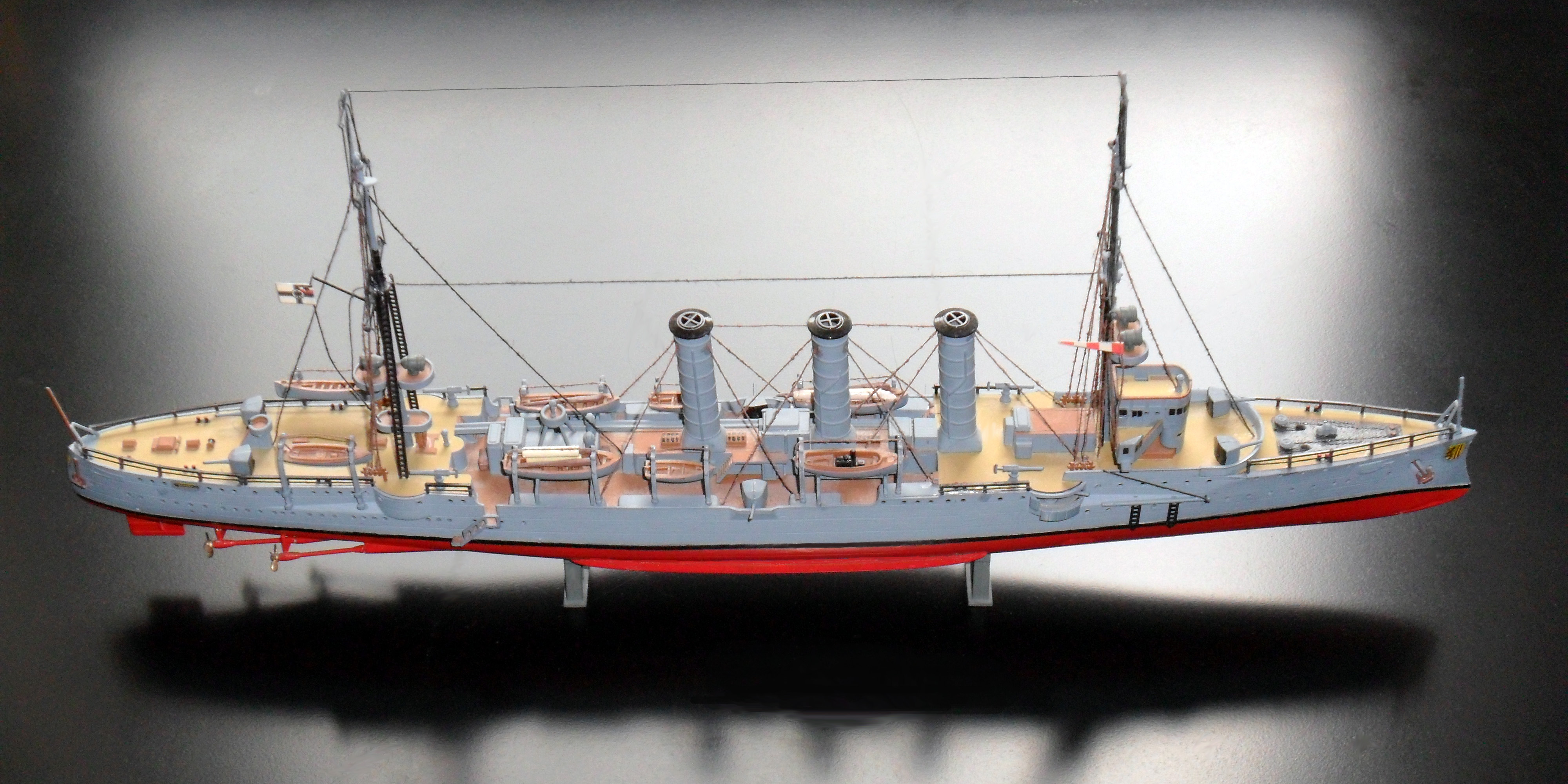 SMS Dresden - Plastikmodellbausatz von Revell im Maßstab 1:350